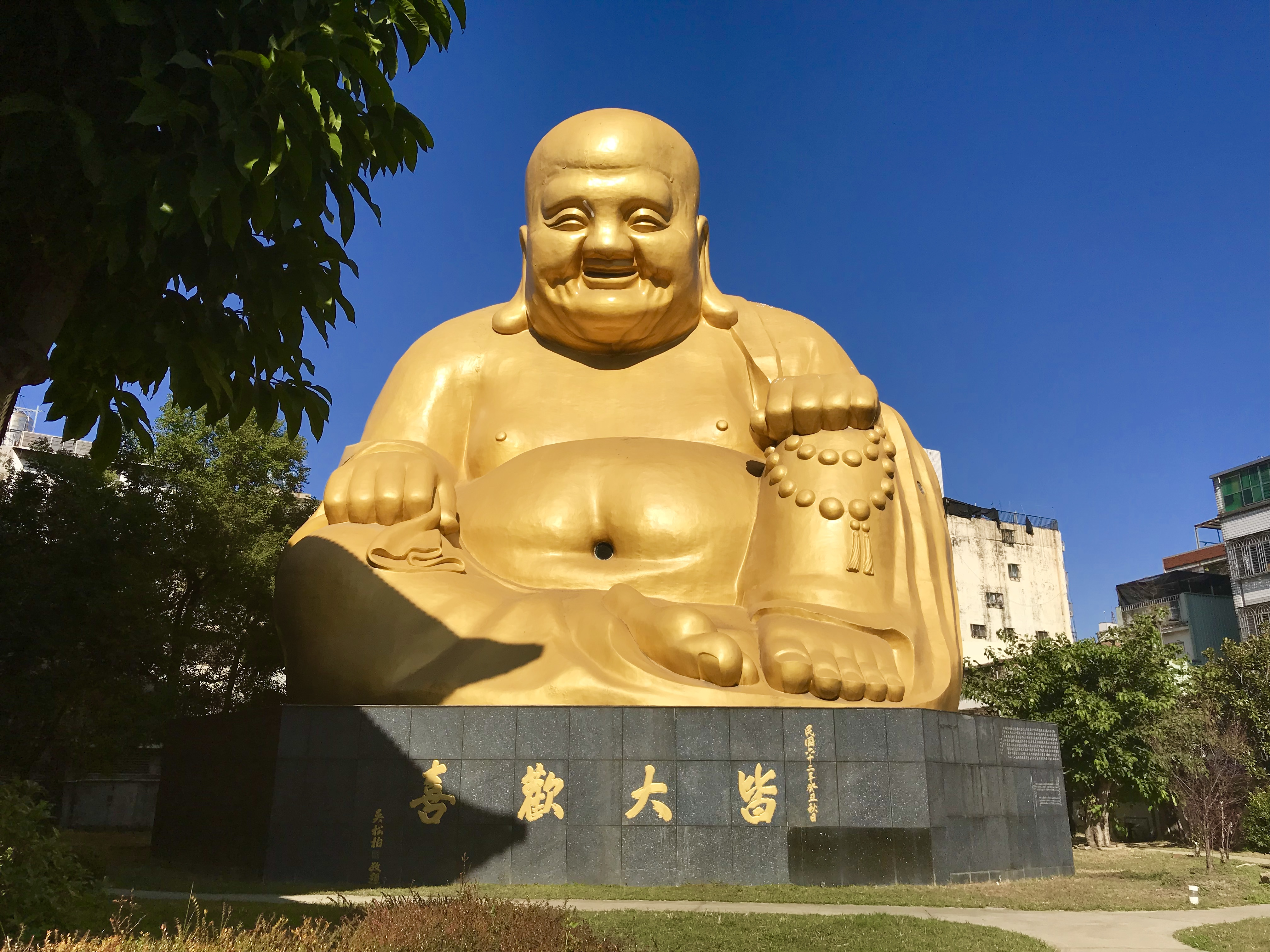 中文（台灣）: 寶覺寺彌勒大佛正面照